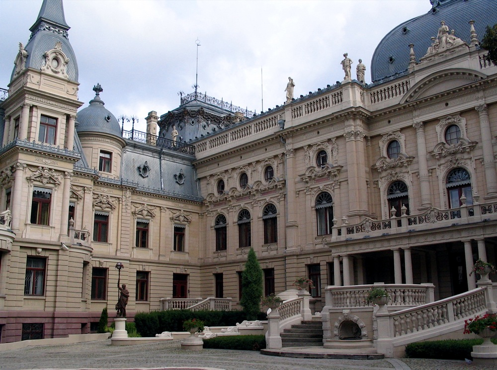 Pałac Izraela Kalmanowicza Poznańskiego w Łodzi, dziś Muzeum Historii Miasta Łodzi